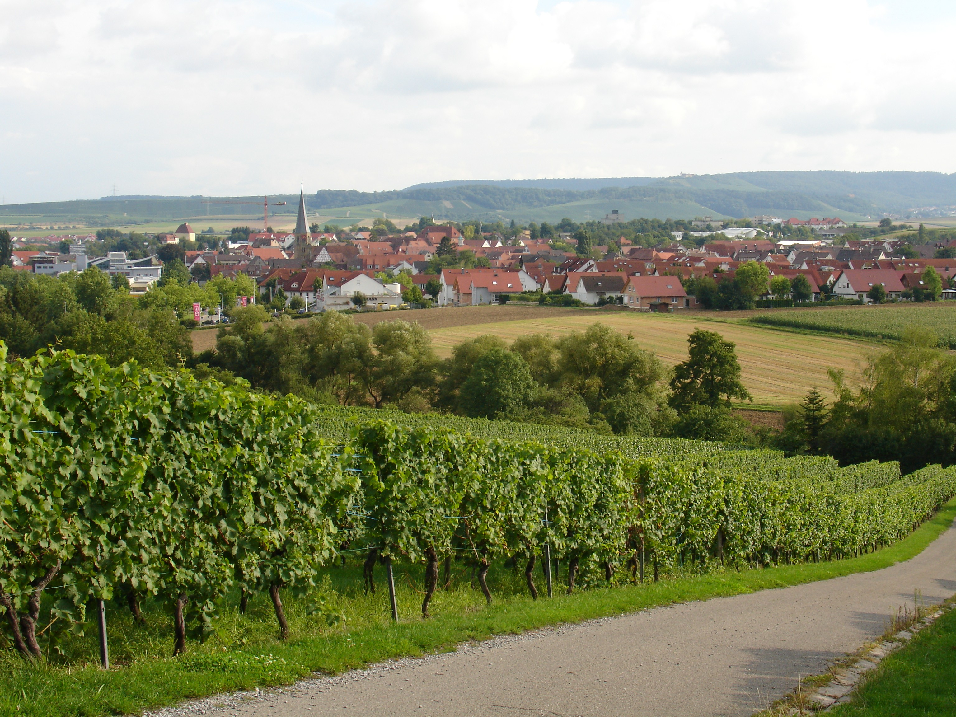 Die Stadt Brackenheim. Ziemlich genau nach Süden (~190°) fotografiert.